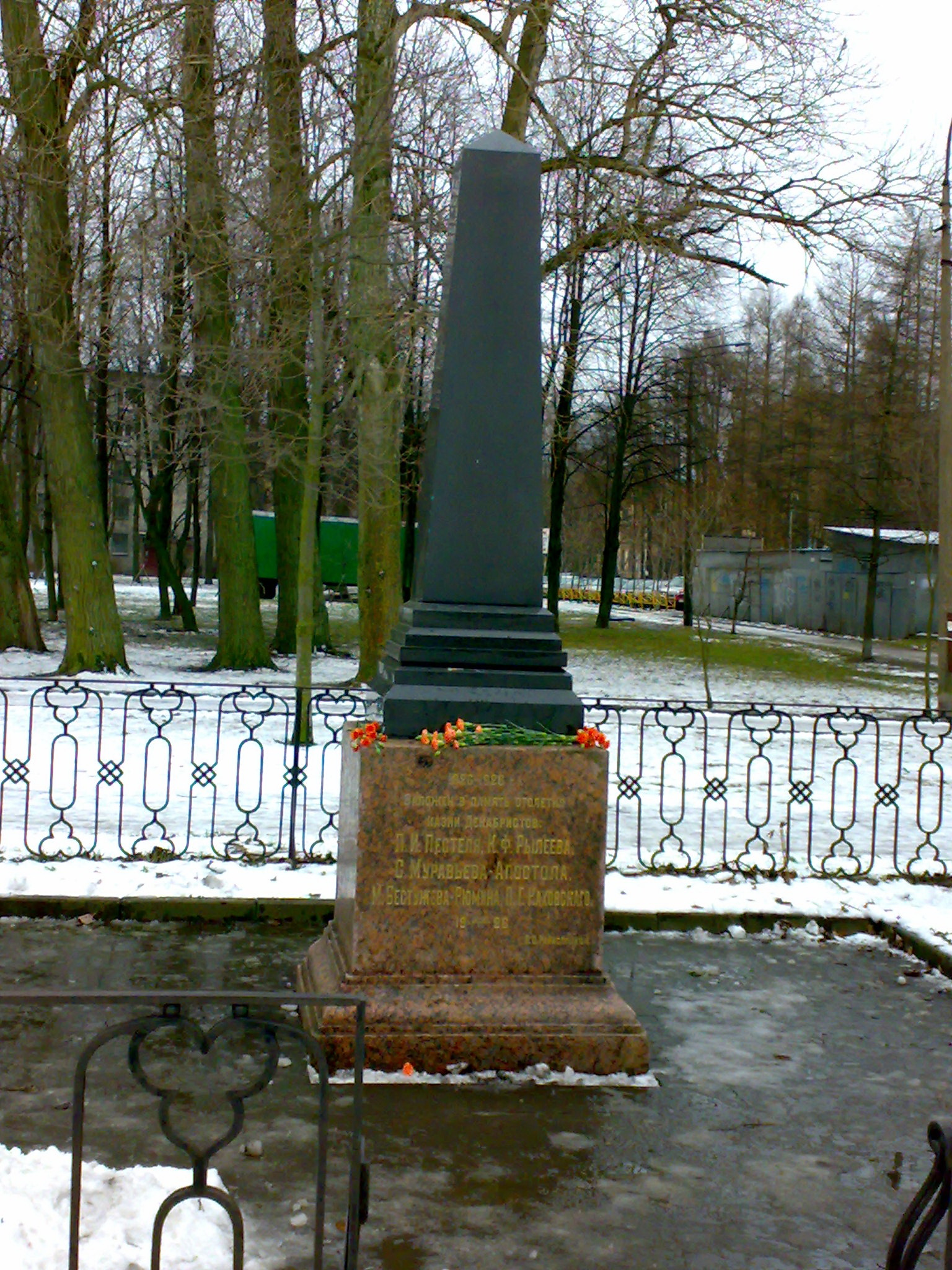 Памятный знак в сквере Декабристов